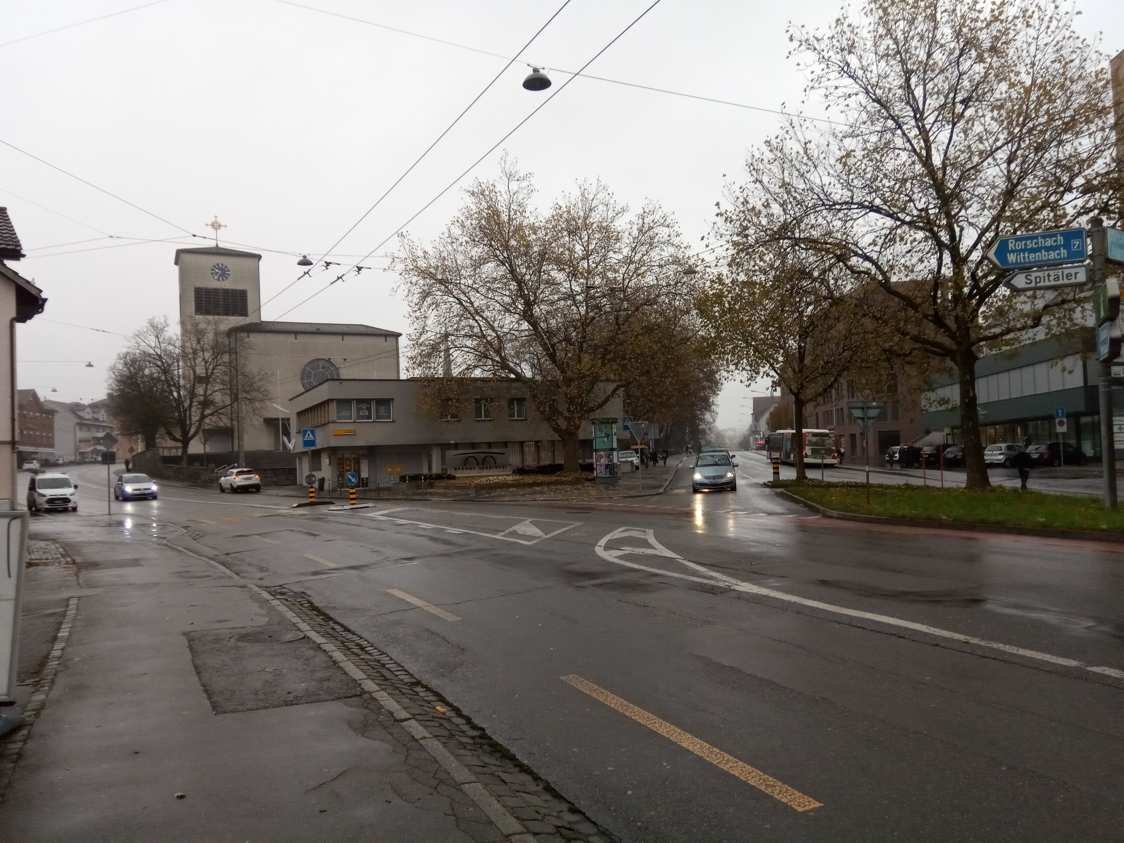 Katholische Pfarrkirche St. Martin, Poststelle 9014 Bruggen, Zürcherstrasse und Einmündung Fürstenlandstrasse